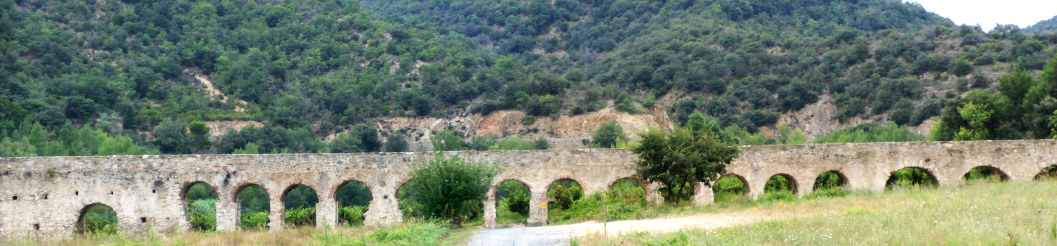 Pont-aqueduc romain d'Ansignan (Pyrénées-Orientales, France). vue d'aval rive gauche